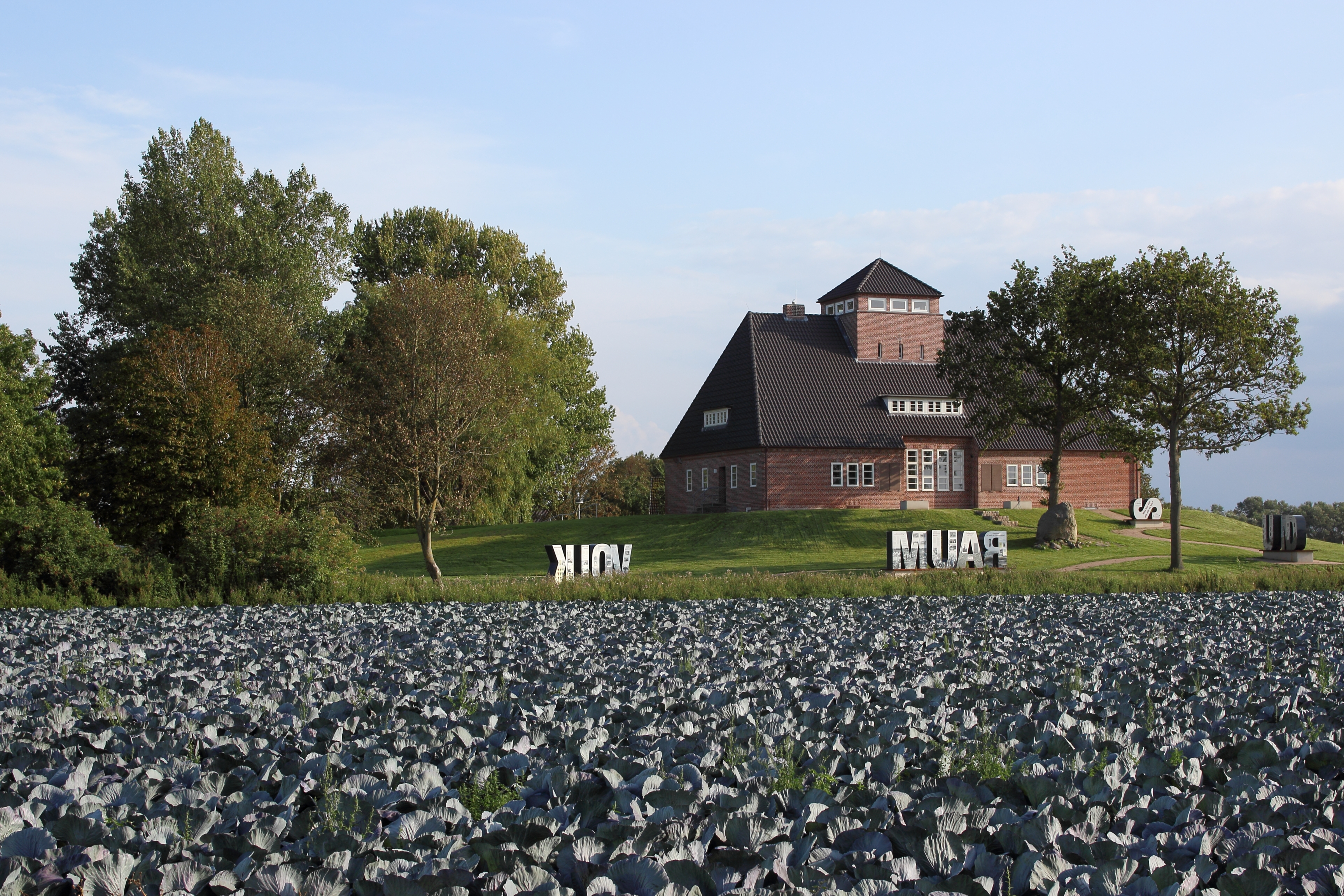 Historischer Lernort Neulandhalle, Dieksanderkoog, 20. August 2019